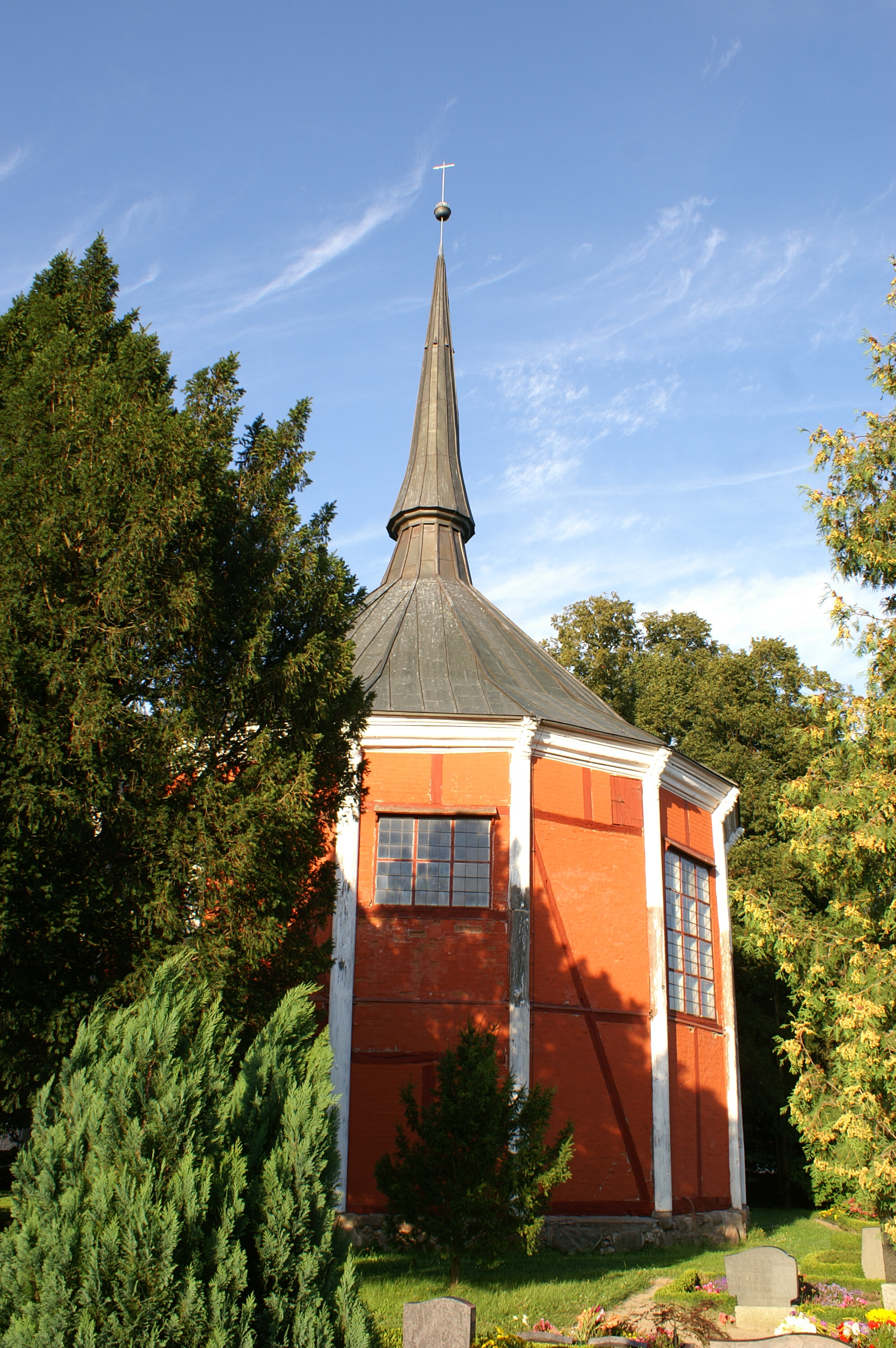 Schlosskapelle Griebenow, Landkreis Nordvorpommern